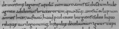 Ausschnitt aus den Annalen des Tacitus. Mittelalterliche Abschrift in vorkarolingischen Minuskeln: Codex Mediceus I = Plut. 68,1 (9. Jahrhundert). Eventuell Abschrift von dieser. Reproduktion durch A. W. Sijthoff, 1902.